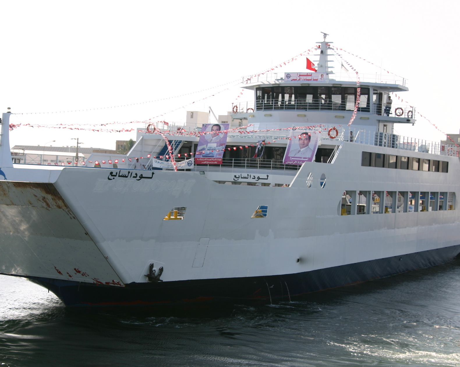 Photo perso août 2007 représentant le car-ferry El Loud 7 au départ de Sfax pour les îles Kerkennah (Tunisie).